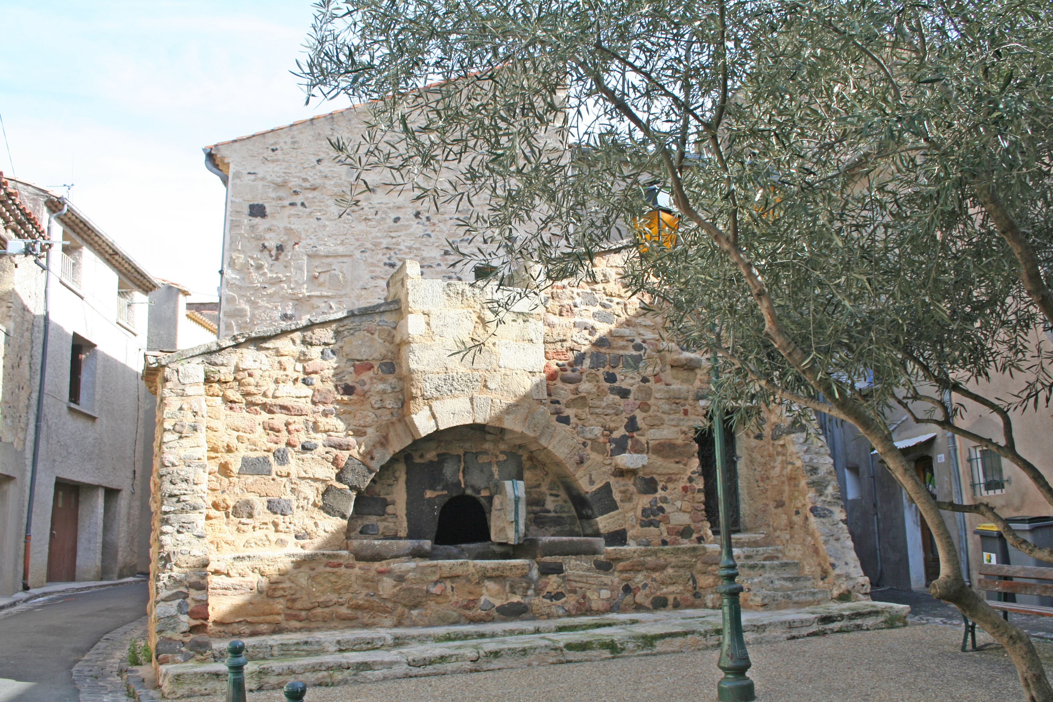 Montblanc (Hérault) - four communal.